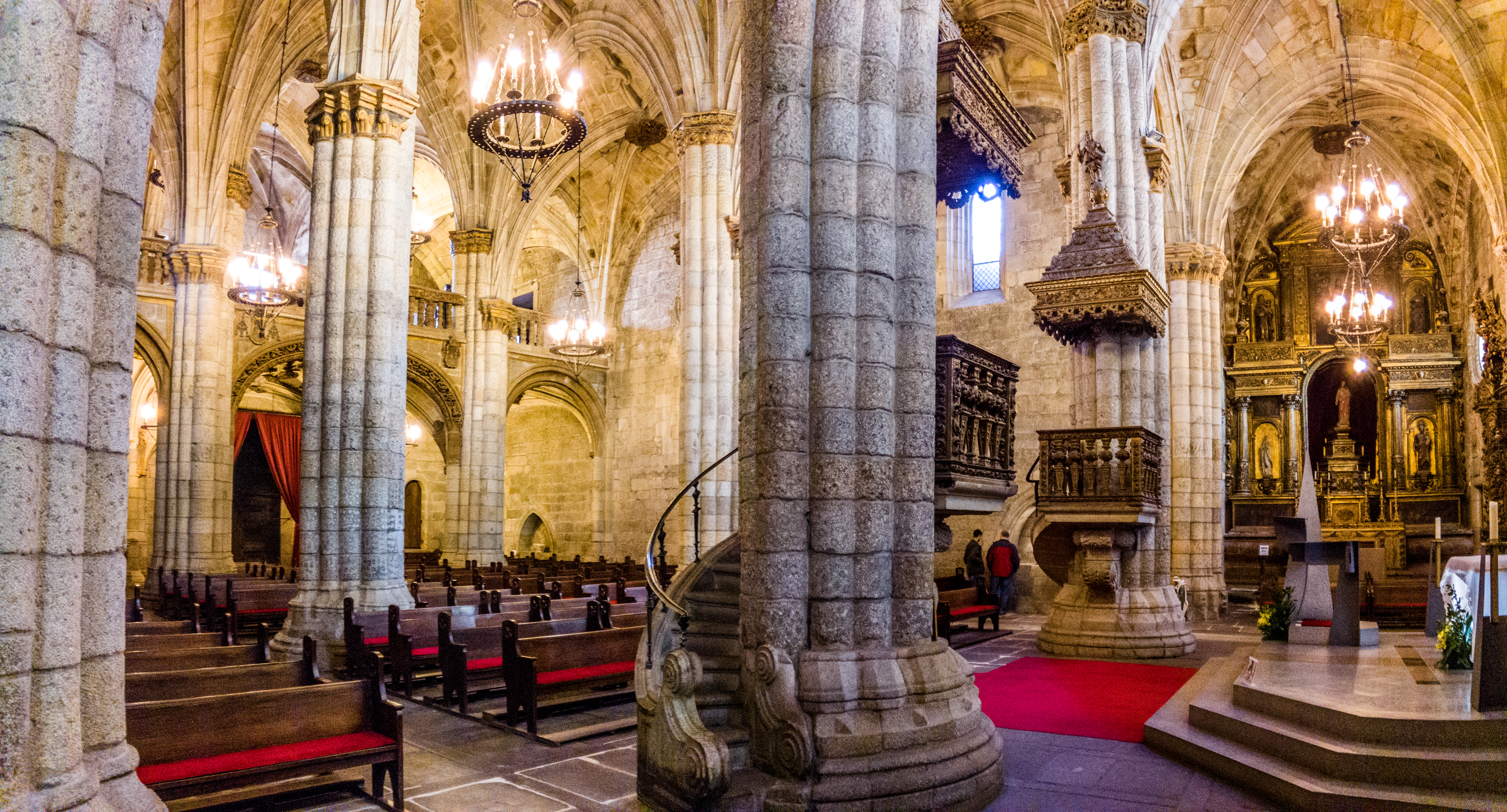 IMG_20141226_162610-Pano.jpg